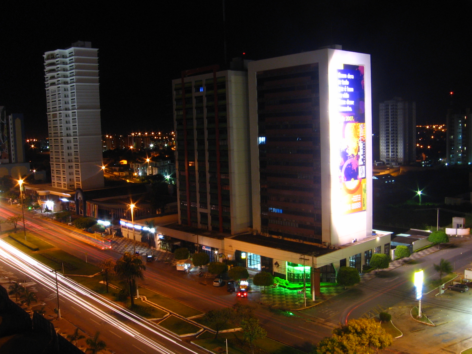 Cuiabá, Mato Grosso, Brasil.